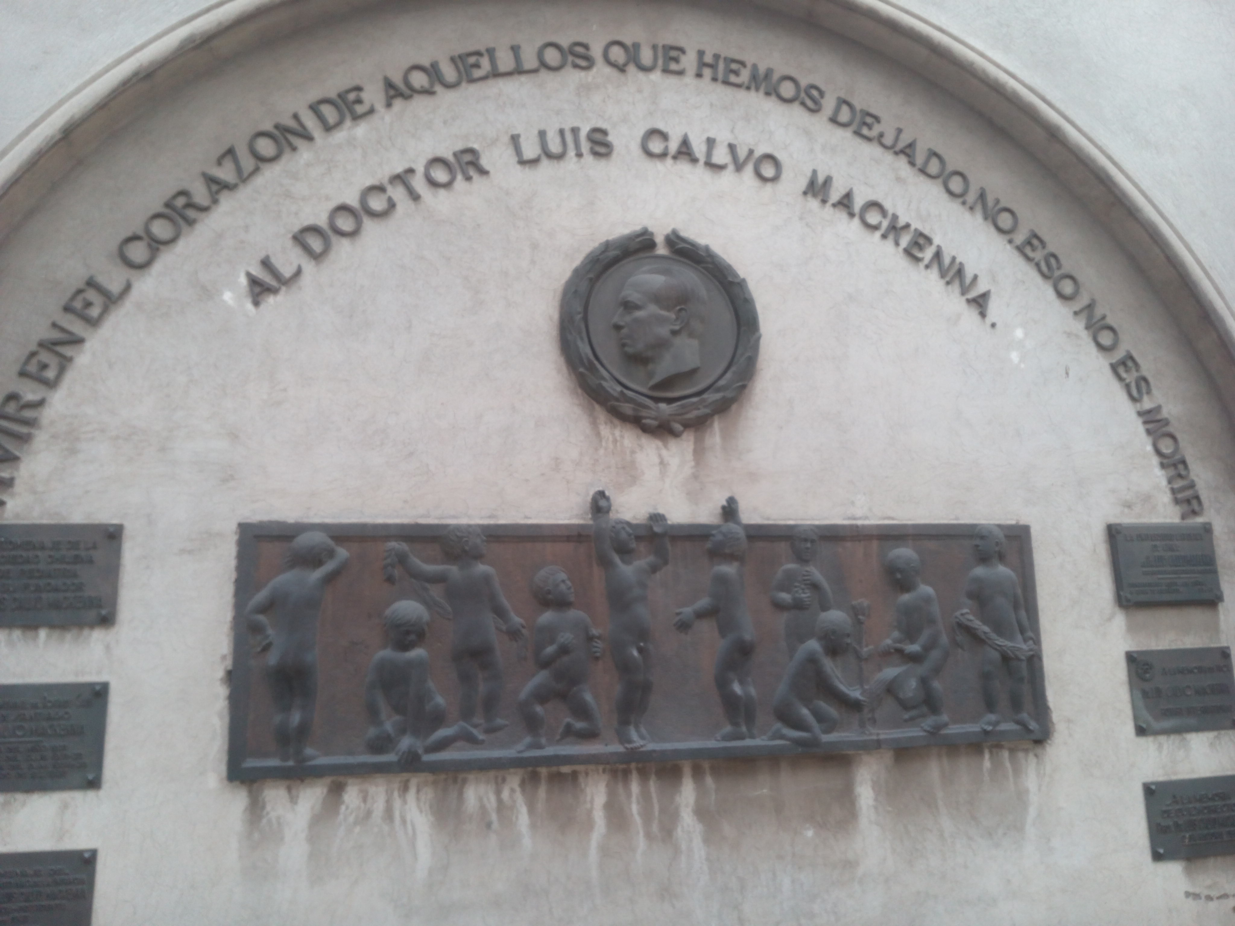 Homenaje al Doctor Luís Calvo Mackenna en su sepultura en el cementerio católico de Santiago